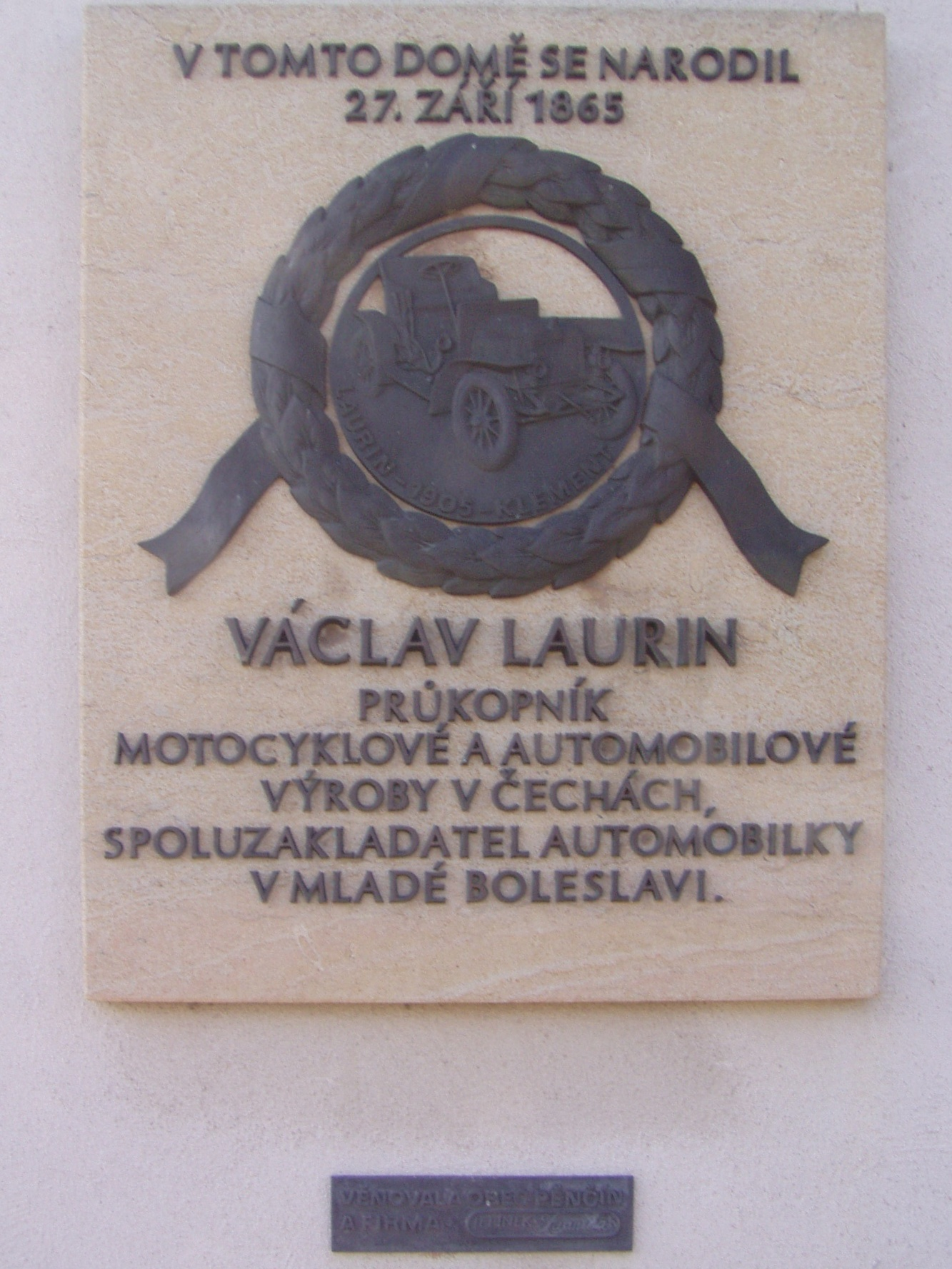 Pamětní deska na rodném domě Václava Laurina, českého průmyslníka. Kamení, část obce Pěnčín okres Liberec.